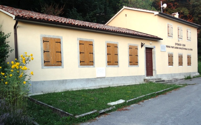 Spomen dom u Brgudcu